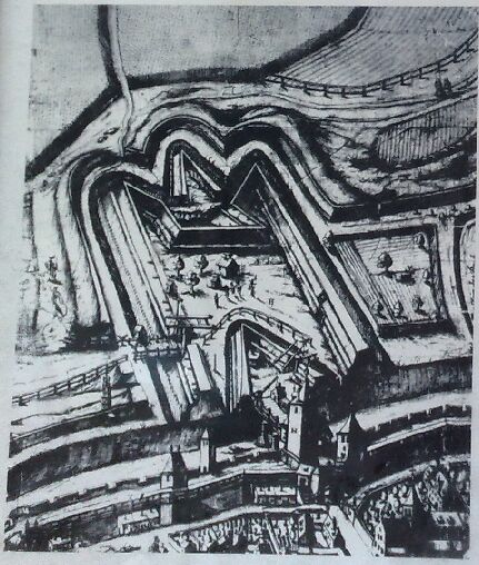 Peterstor in Regensburg mit Stadtbefestigung von Norden. Ausschnitt aus dem Vogelschauplan der Stadt von ca. 1630 nach Hans Georg Bahre.